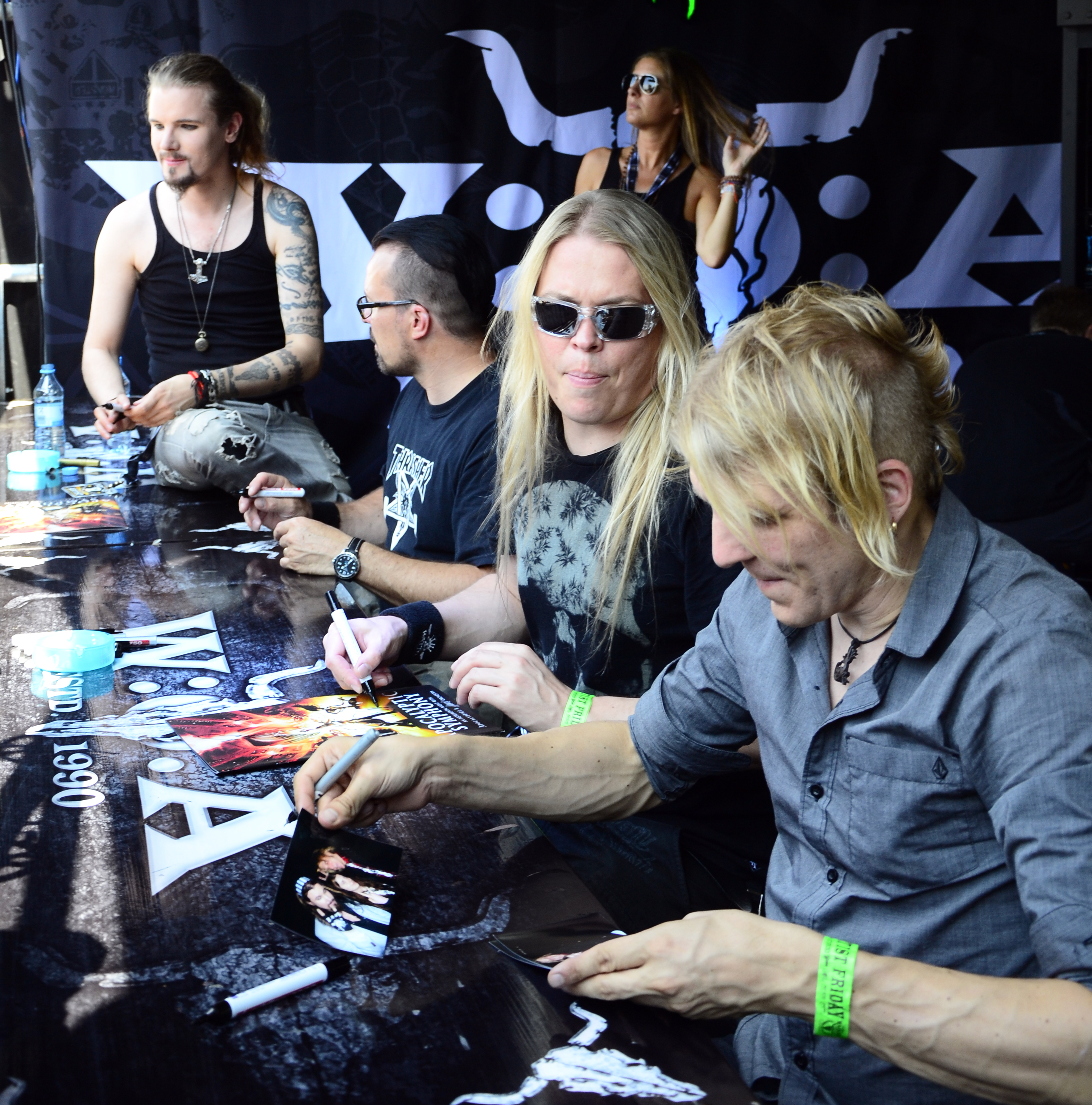 Apocalyptica beim Meet & Greed auf dem Wacken Open Air 2014